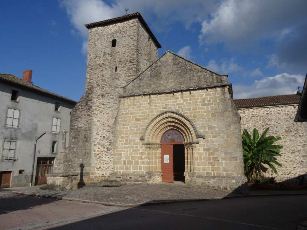 Église Saint-Saturnin de Chaillac-sur-Vienne